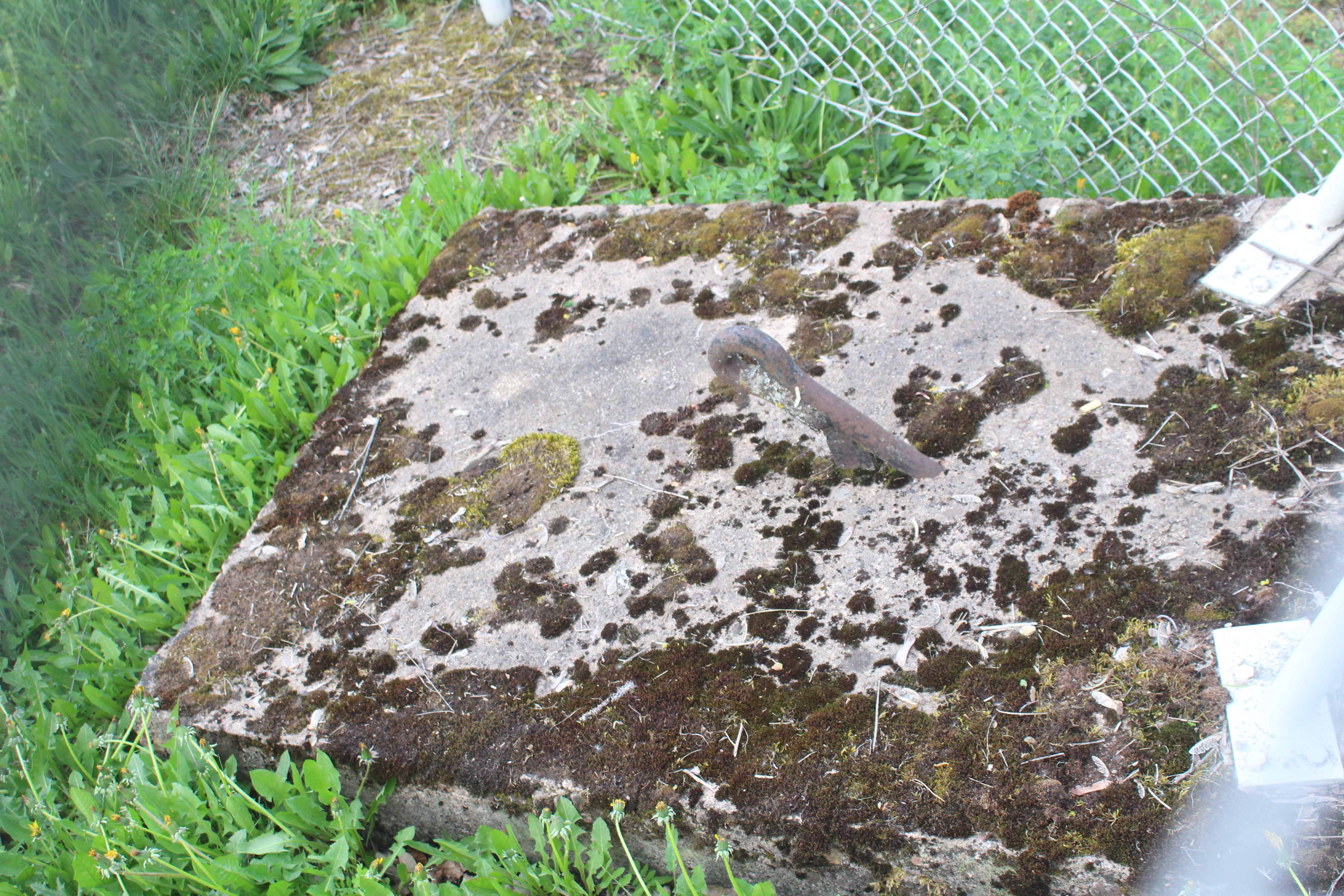 Aufgegebenes Pardunenfundament des alten Sendemastes des Senders Buchen